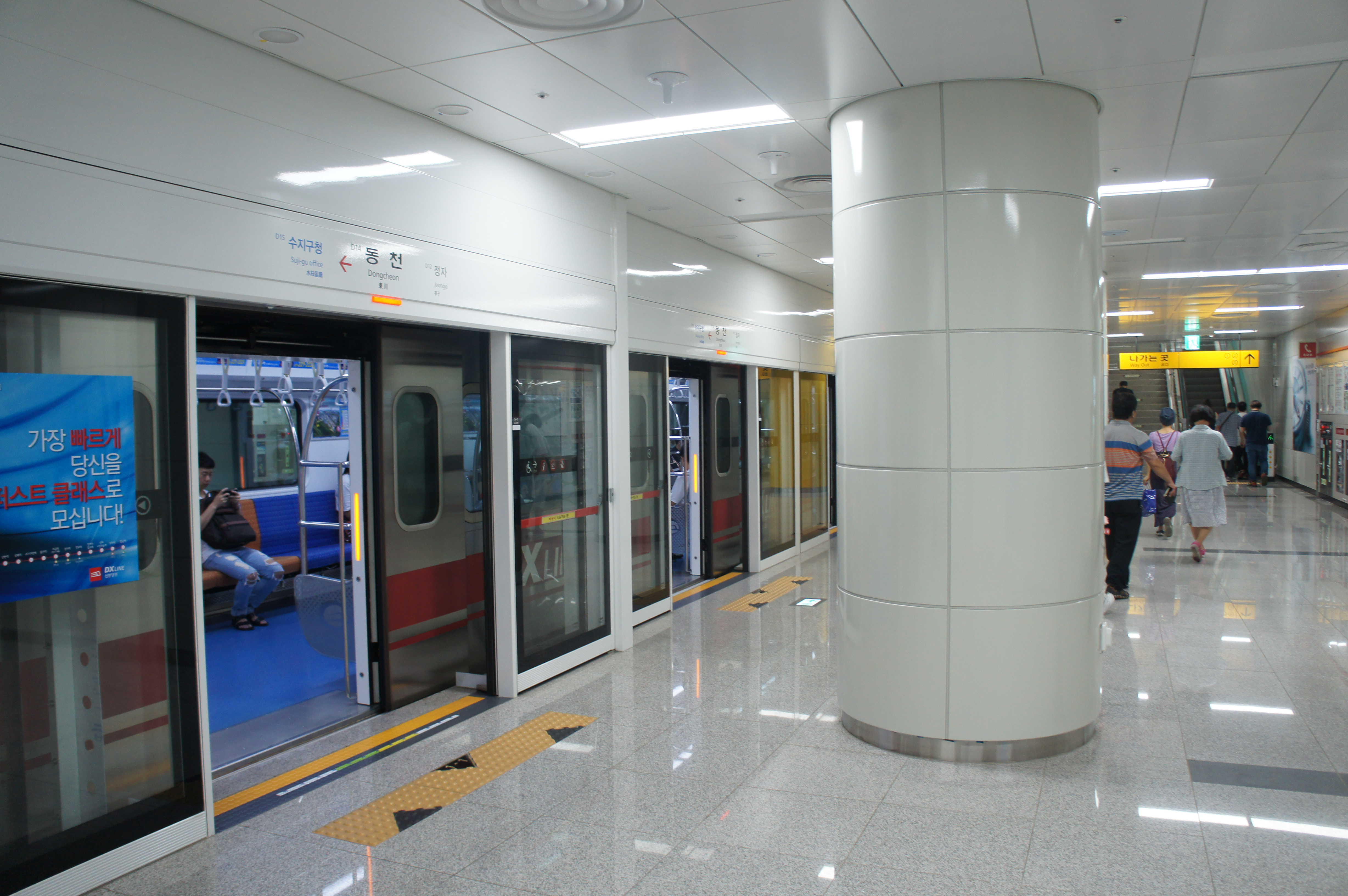 동천역 승강장